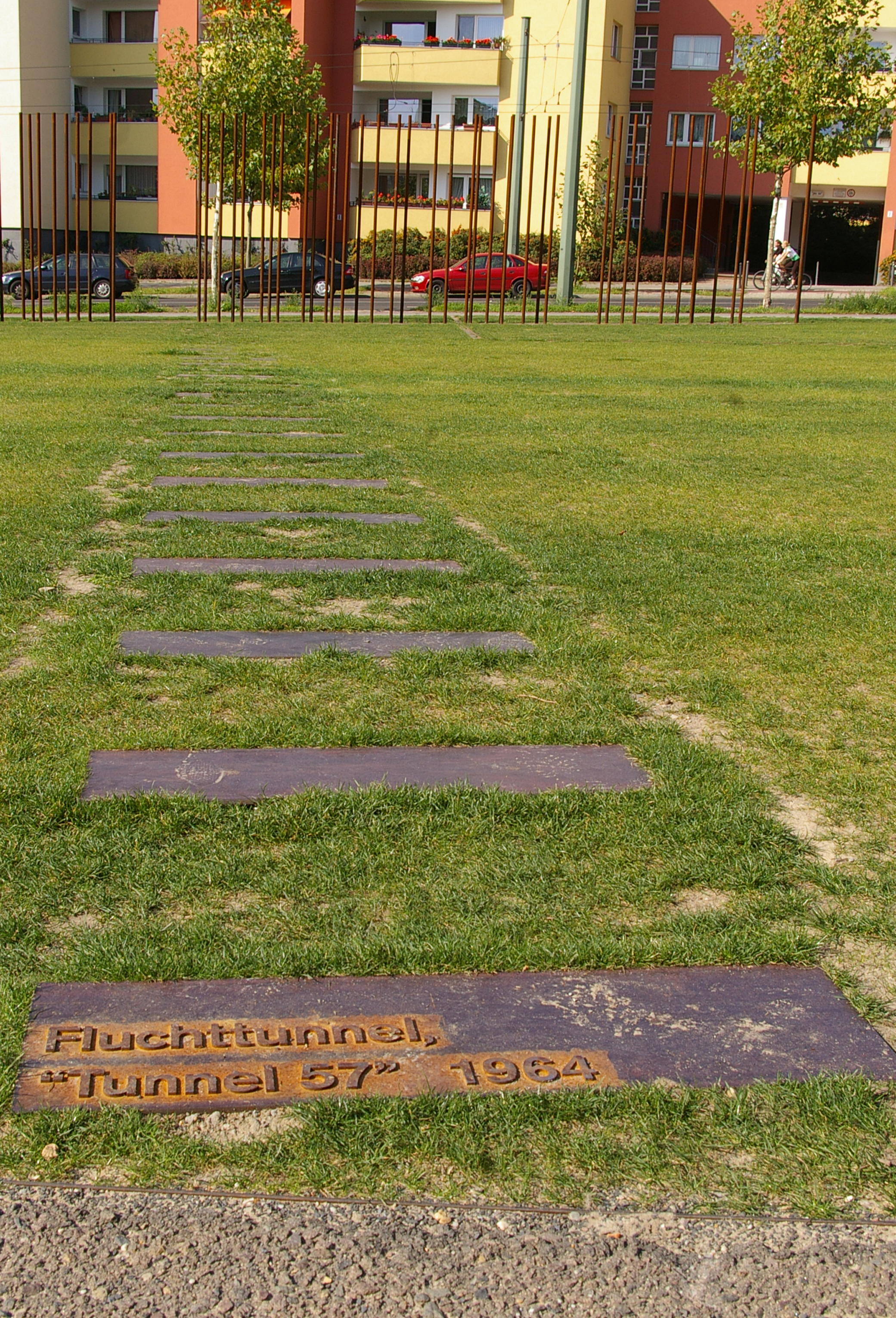 Markierung des Fluchttunnel 57 in der Bernauer Straße